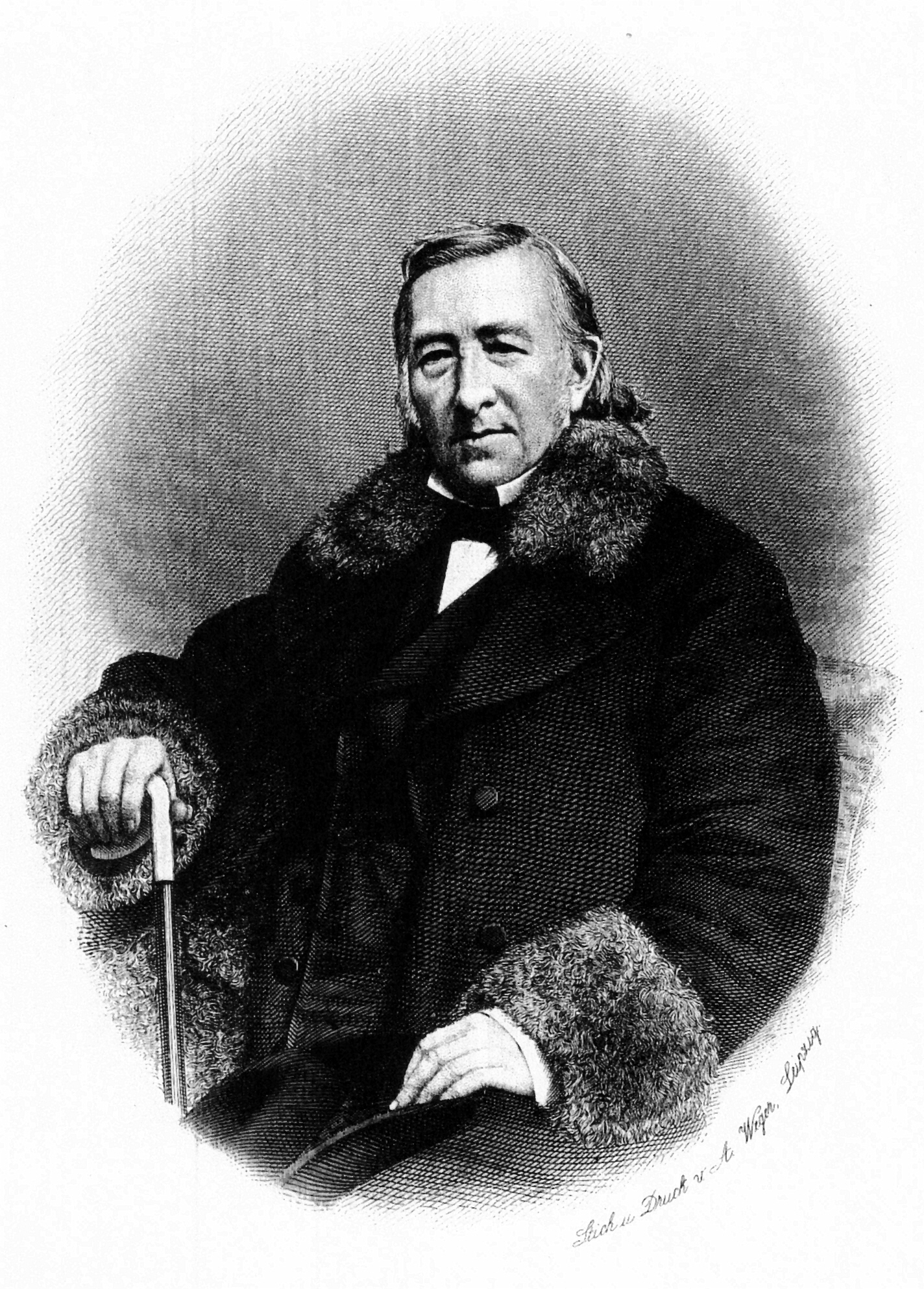 Friedrich von Sydow, deutscher Schriftsteller (Stich, Leipzig)